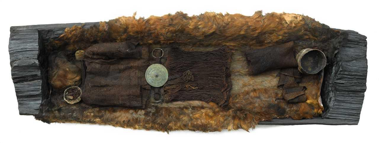 Weibliches Grab von Egtved, Dänisches Nationalmuseum, Kopenhagen, Dänemark